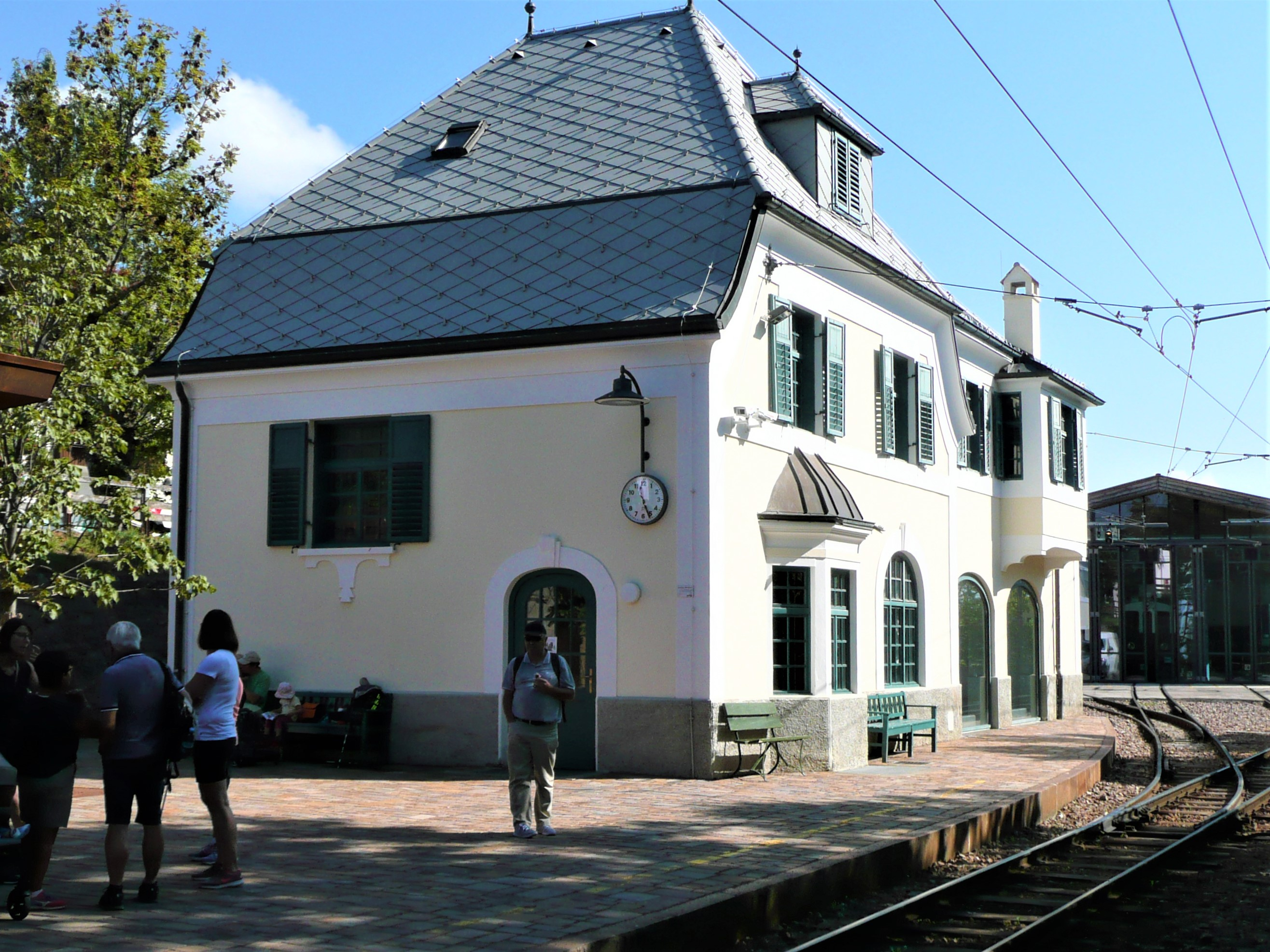 Empfangsgebäude der Rittner Bahn in Oberbozen